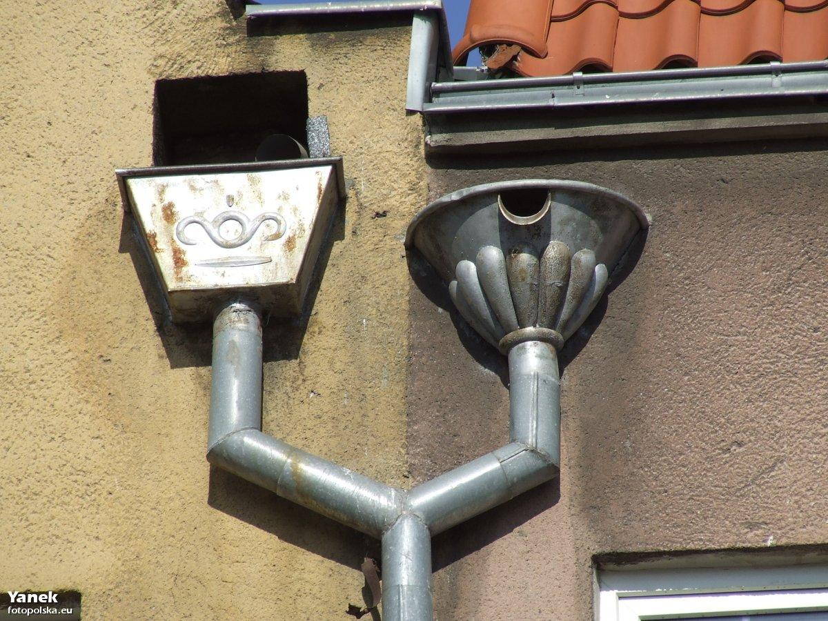 Kosz